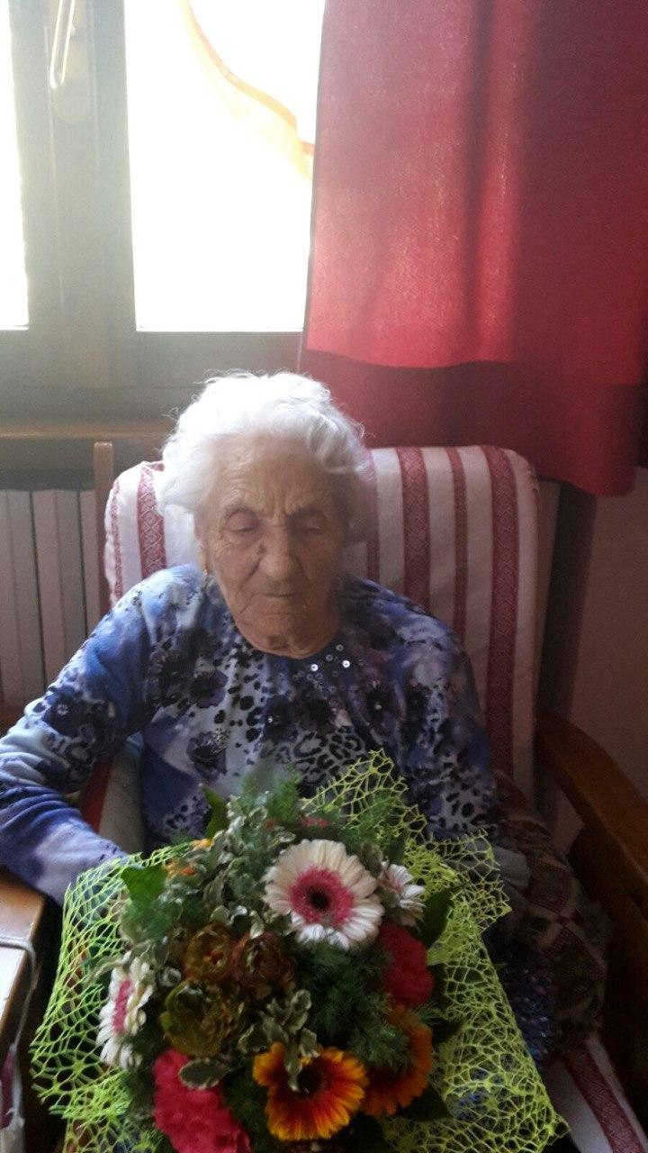 Erminia Bianchini